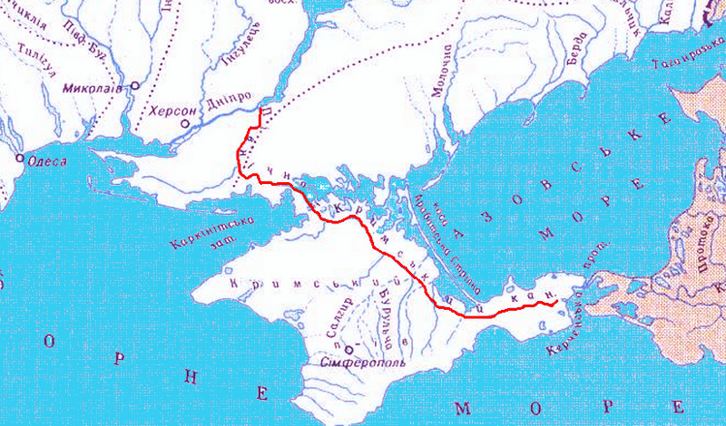 Nord-Krim-Kanal. Verbindet den Denpr am Kachowkaer Stausee mit dem Osten der Krim